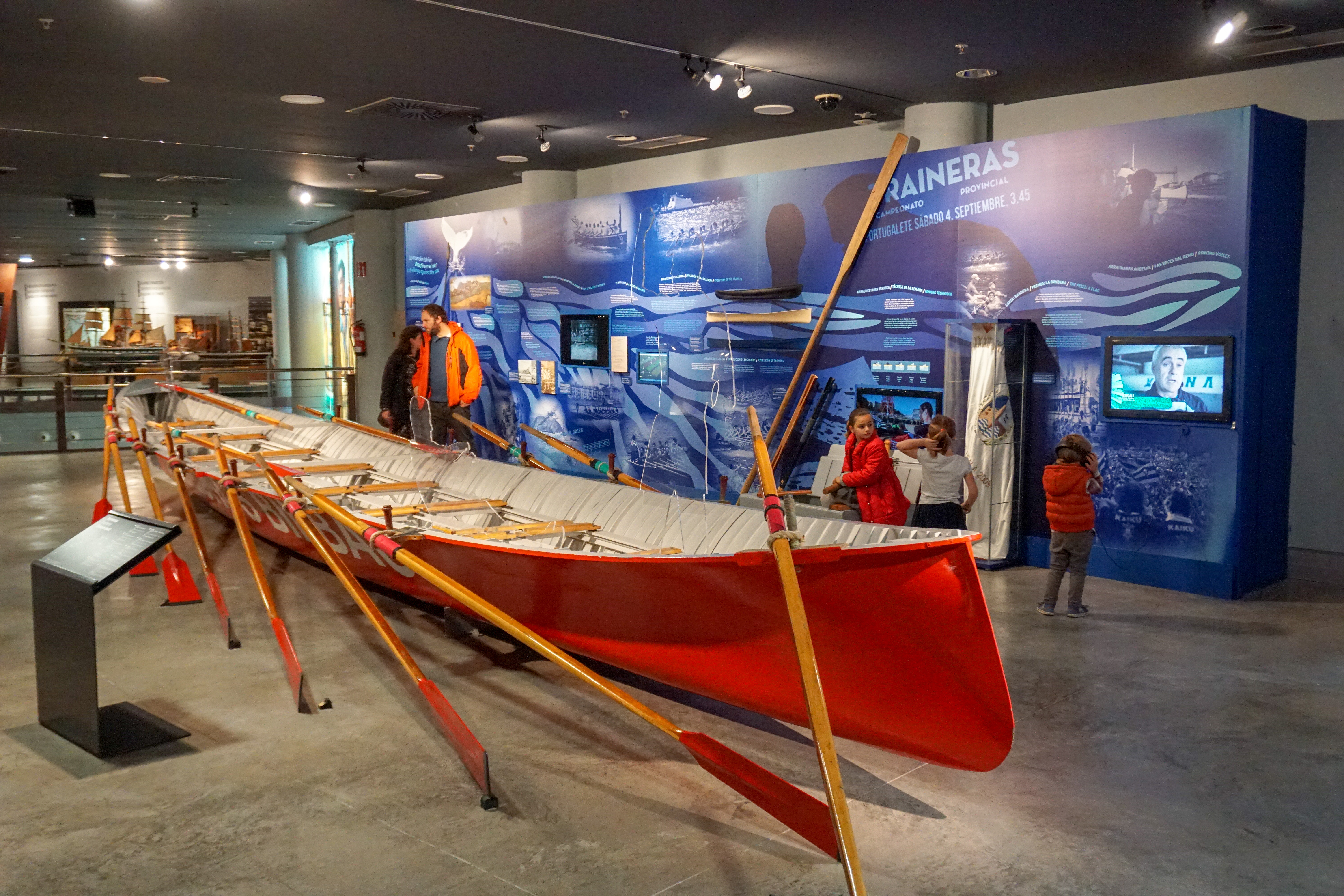 Sección dedicada a las traineras en el Itsasmuseum Bilbao